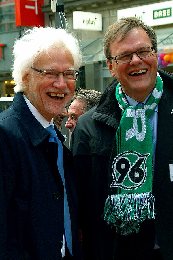 Freuen sich über den gelungenen Auftakt zur Solidaritätstafel 2012 unter dem Motto "Gemeinsam zu Tisch": Bernd Strauch, Erster Bürgermeister von Hannover und Stellvertreter des Oberbürgermeisters, sowie Hans-Martin Heinemann (hier demonstrativ mit Schal des Sportvereins Hannover 96, Stadtsuperintendent des Stadtkirchenverbands Hannover...